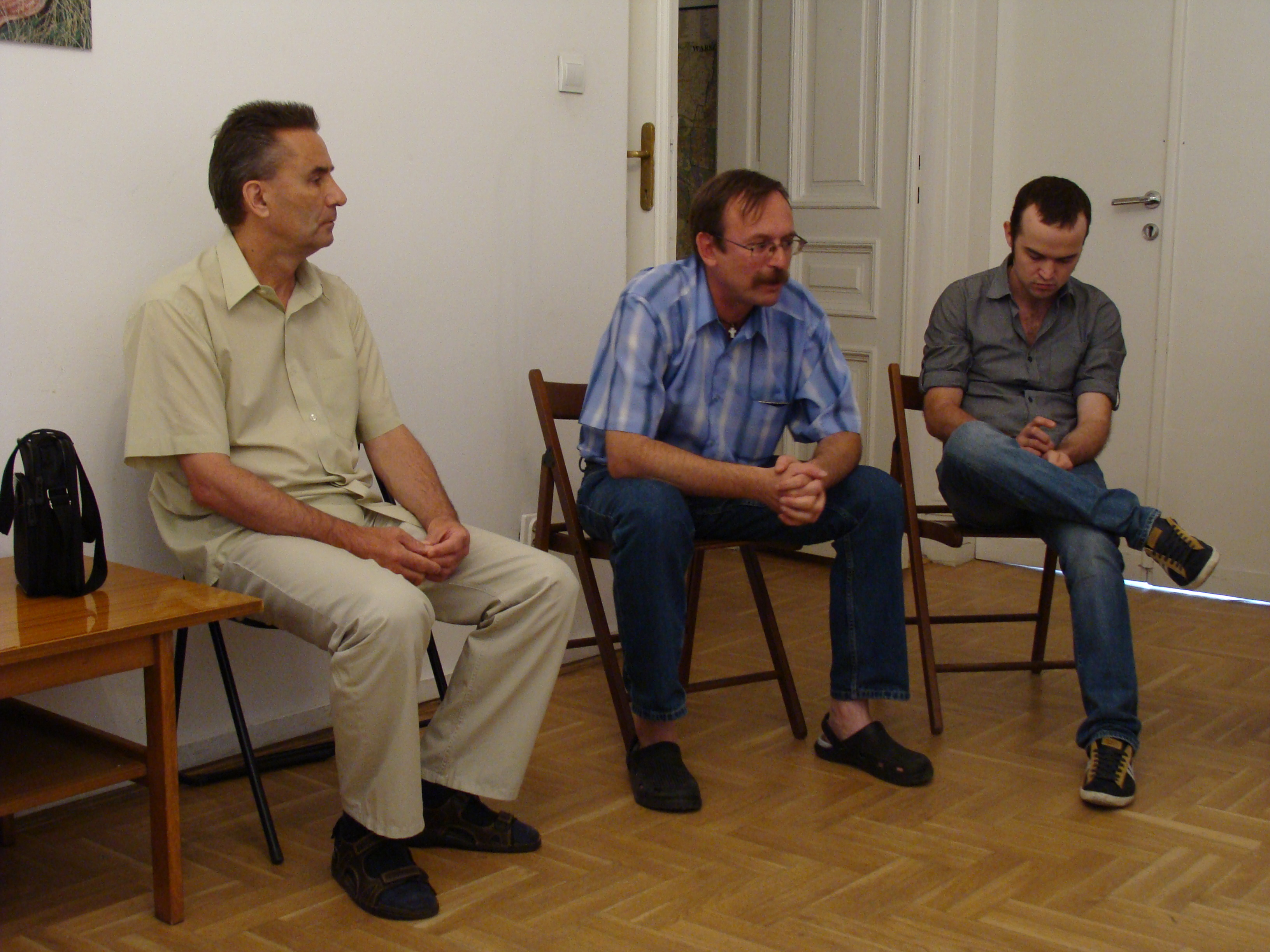 Wiaczasłau Siuczyk opowiada o historii białoruskiego ruchu demokratycznego podczas spotkania w Białoruskim Domu w Warszawie.